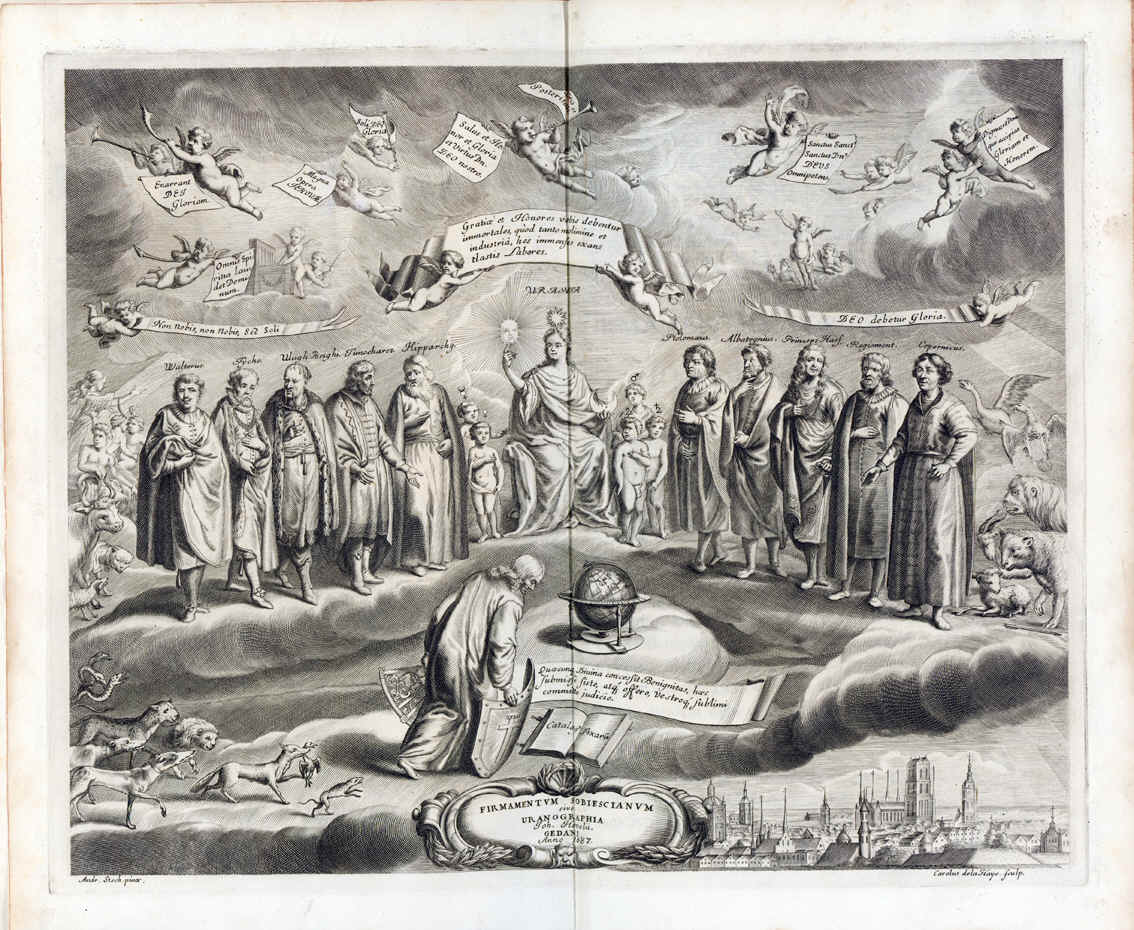 Frontespizio del terzo volume "Firmamentum Sobiescianum, sive Uranographia" dell'opera "Prodromus Astronomia" di Johannes Hevelius, pubblicato nel 1690 a Danzica.